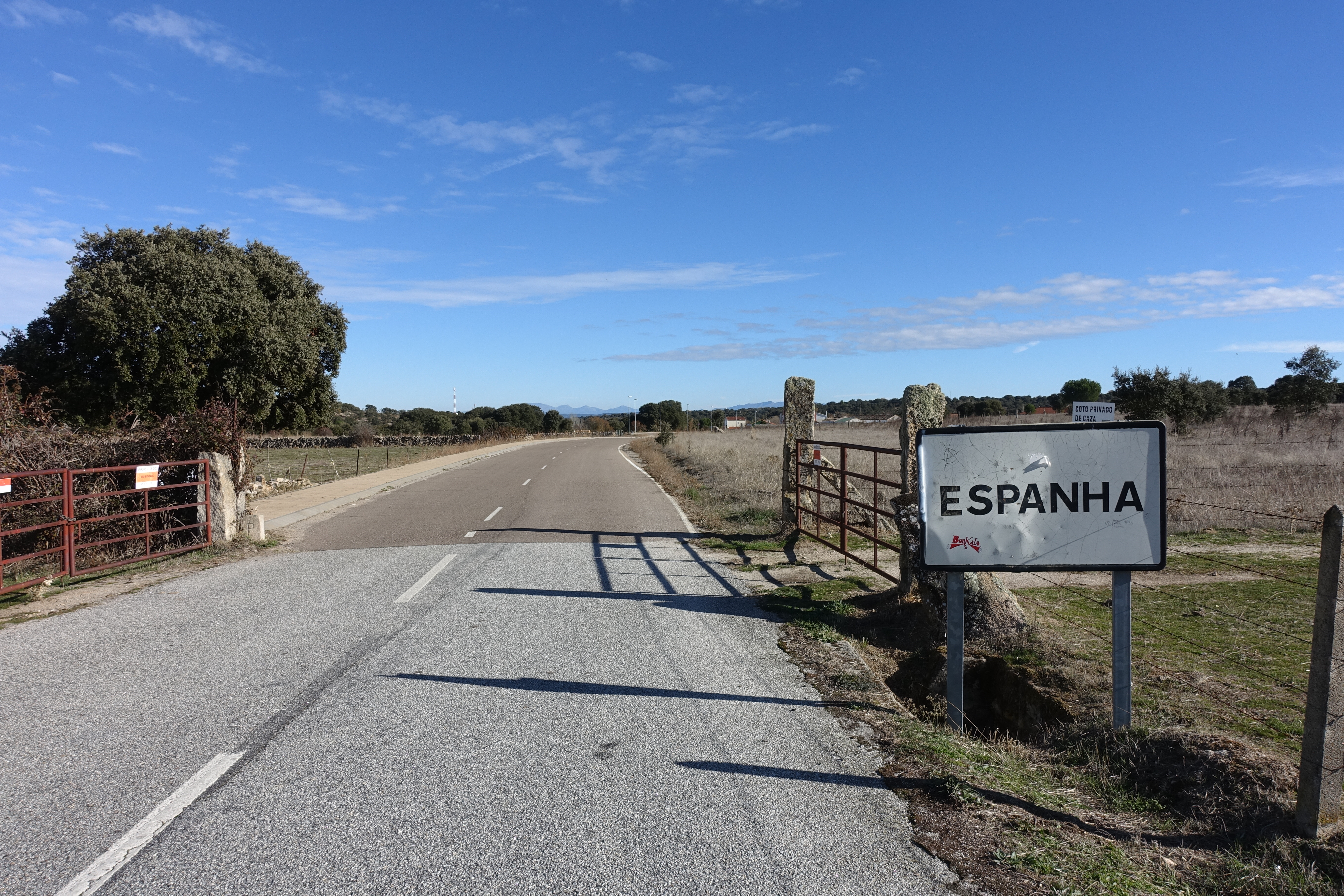 Frontera con Portugal junto a La Alamedilla (Salamanca, España).